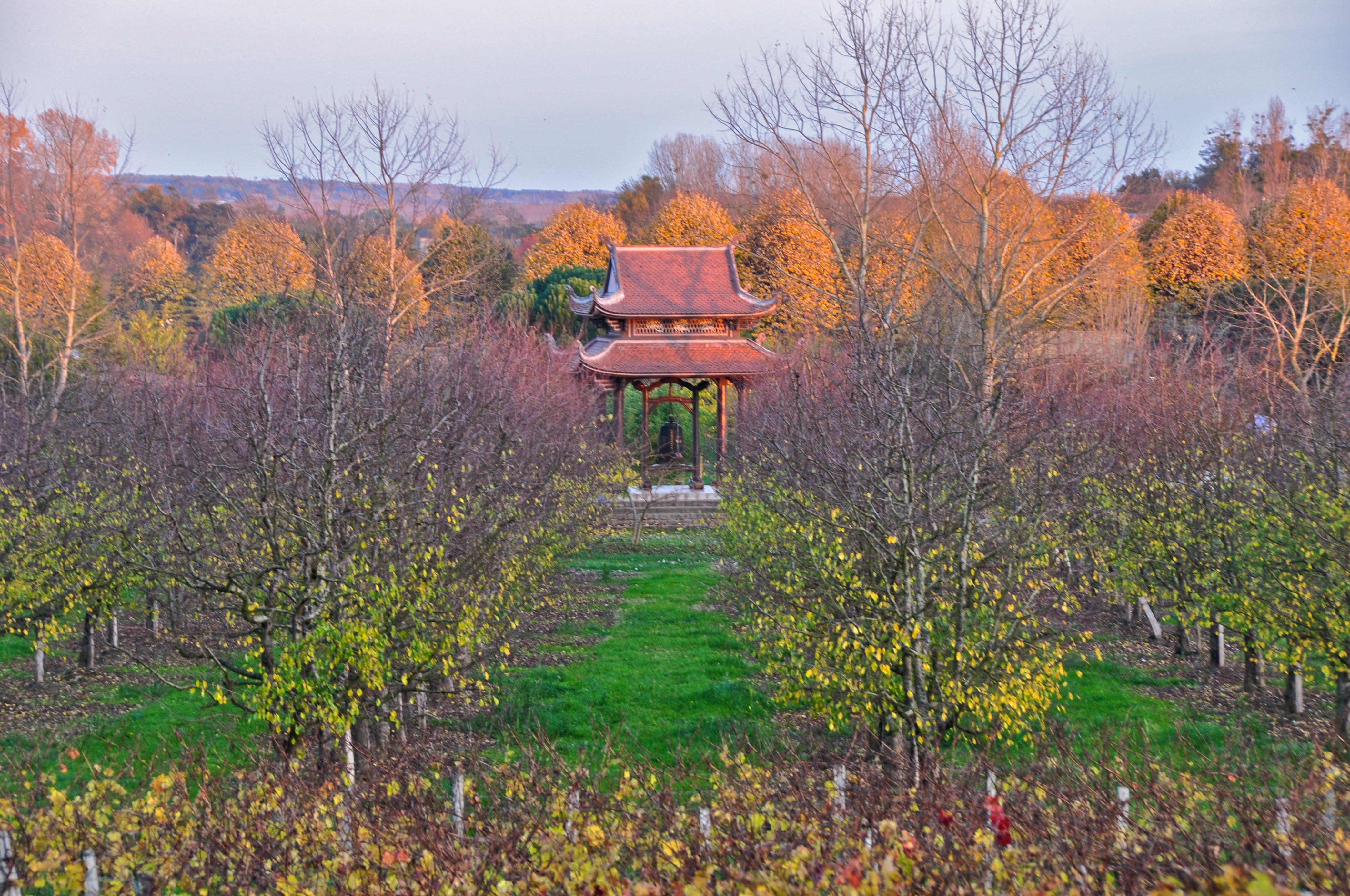 New Hamlet - Plum Village